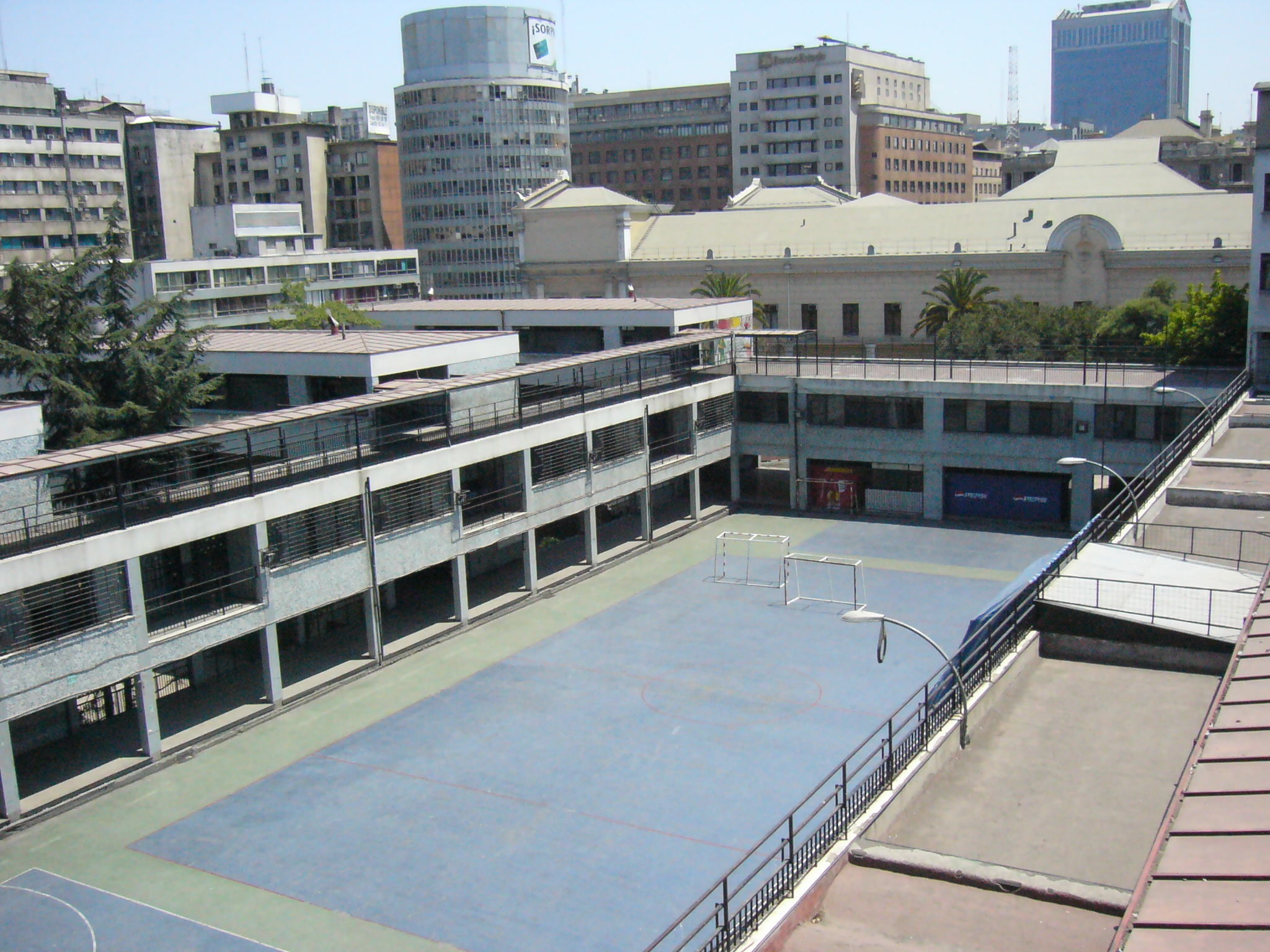 Desde el 7mo piso